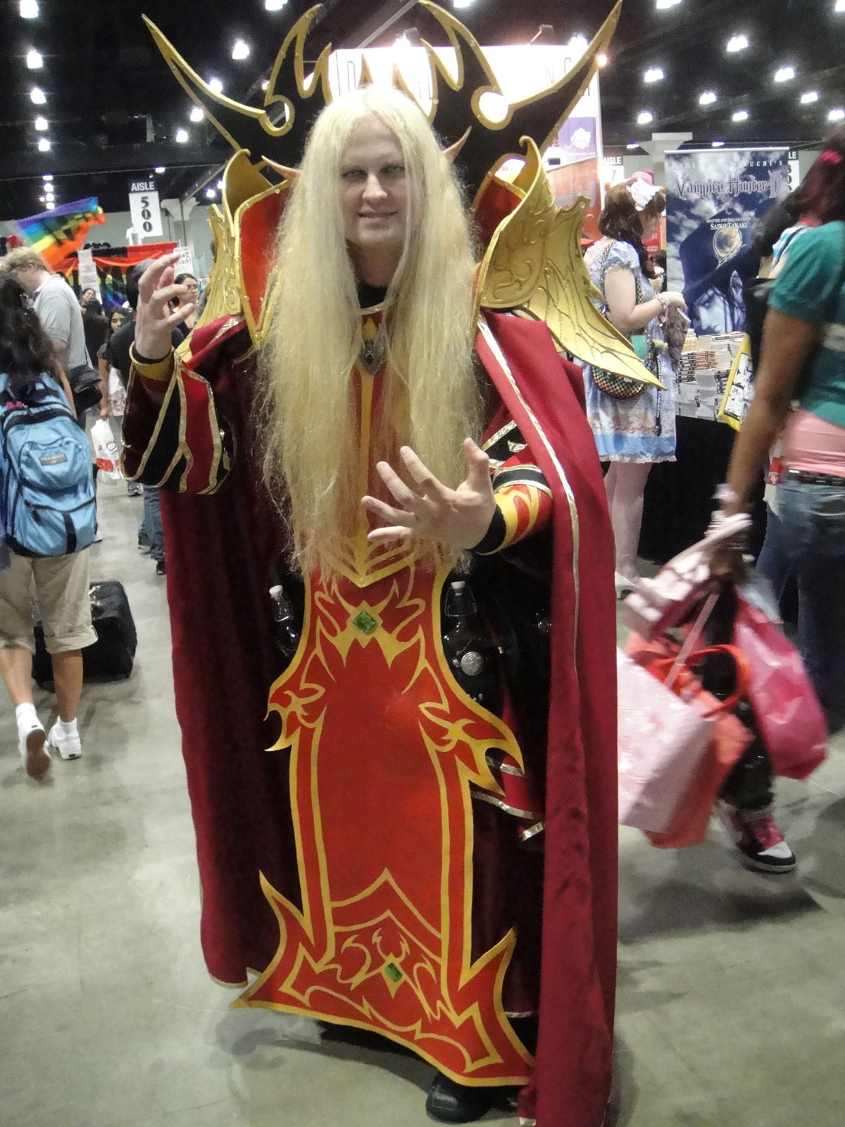 Anime Expo 2010 - LA